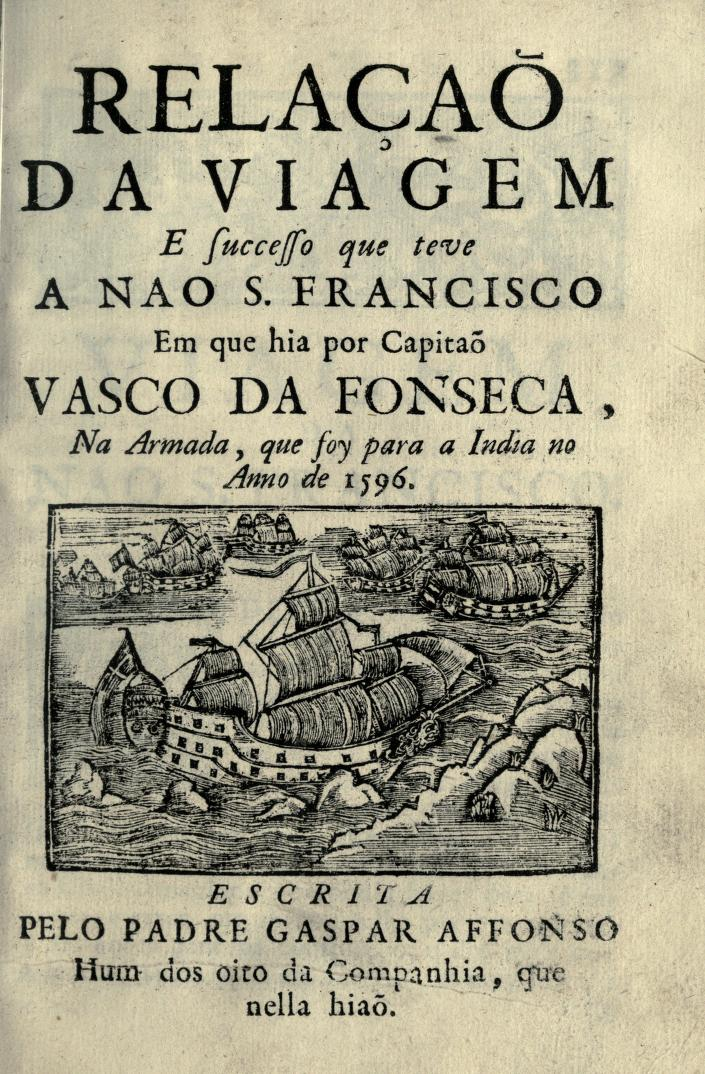 História Trágico-Marítima, Vol. II - Relação da viagem da nau S. Francisco, 1596